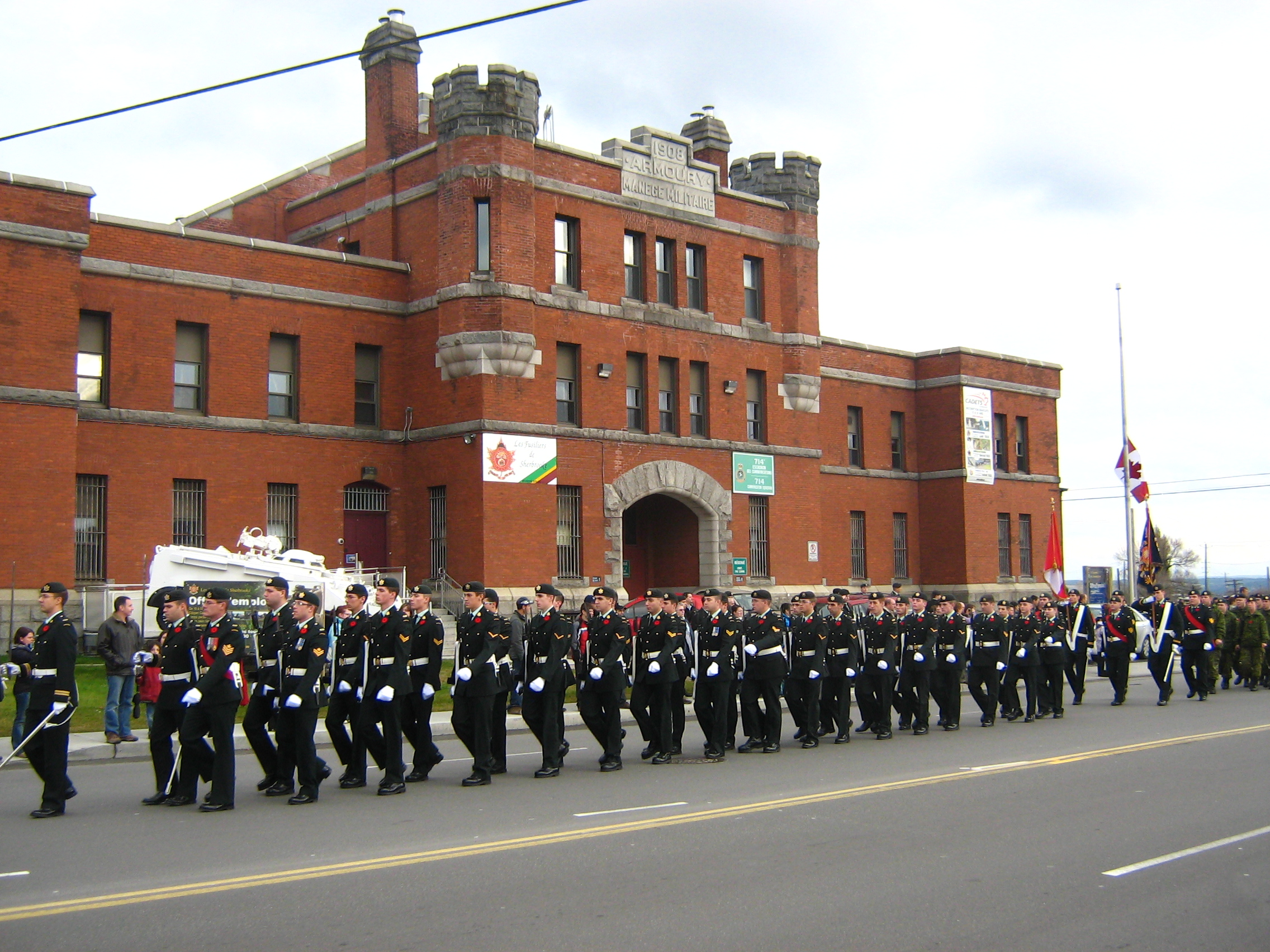 Parade militaire en face du manège des Fusiliers de Sherbrooke